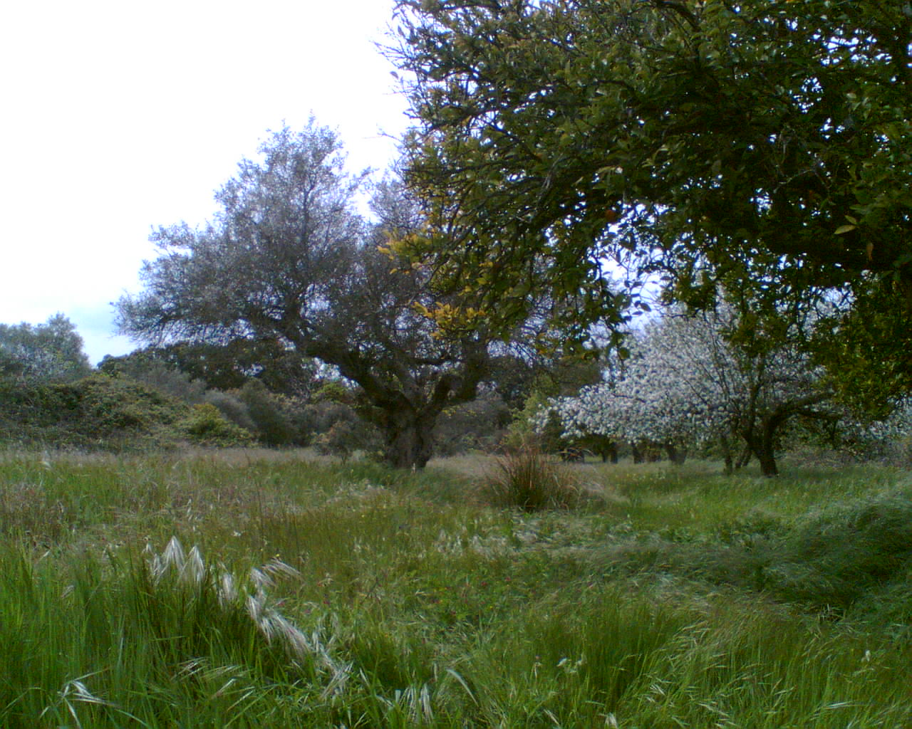 Vegetación término de Talaván